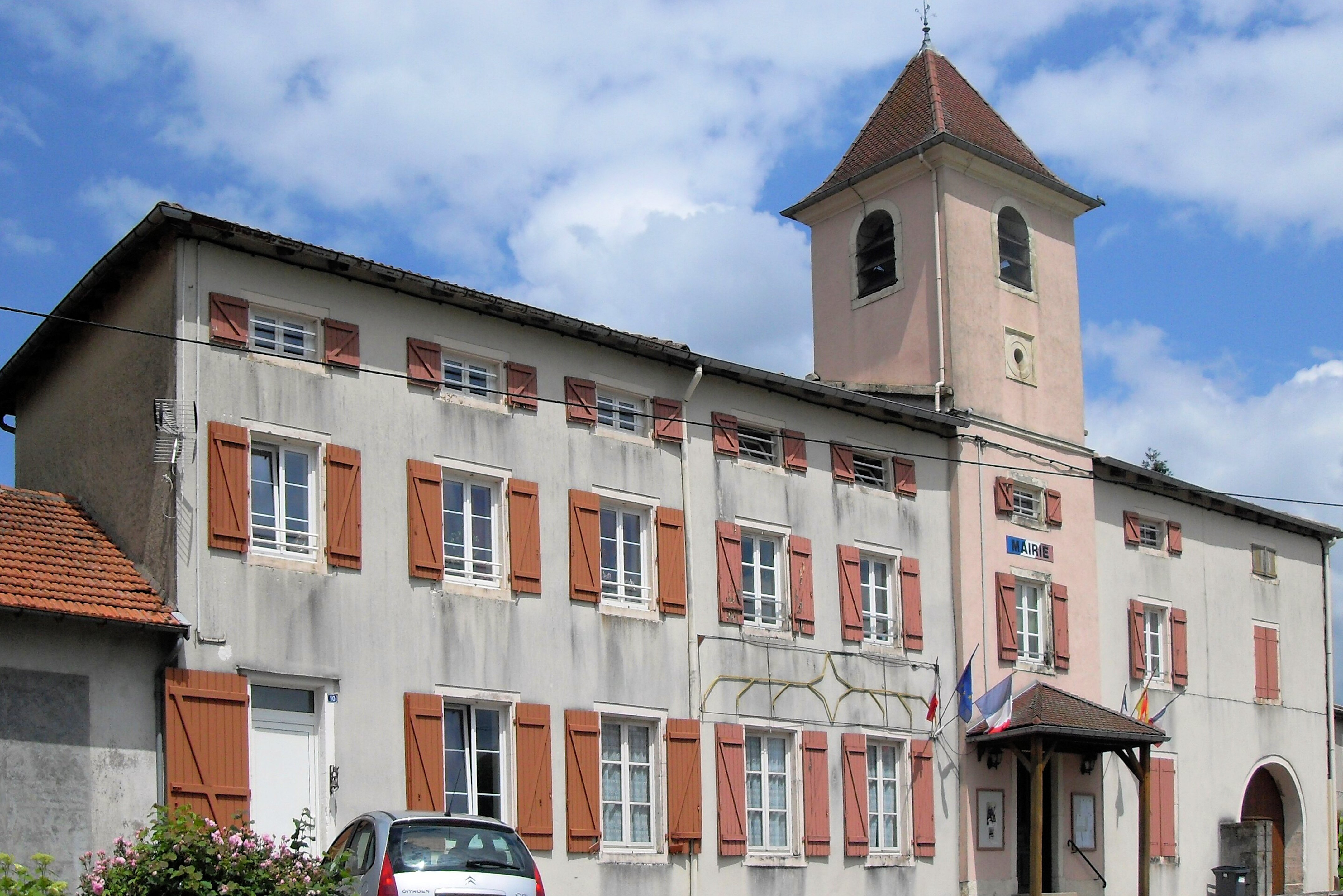 La mairie de Racécourt